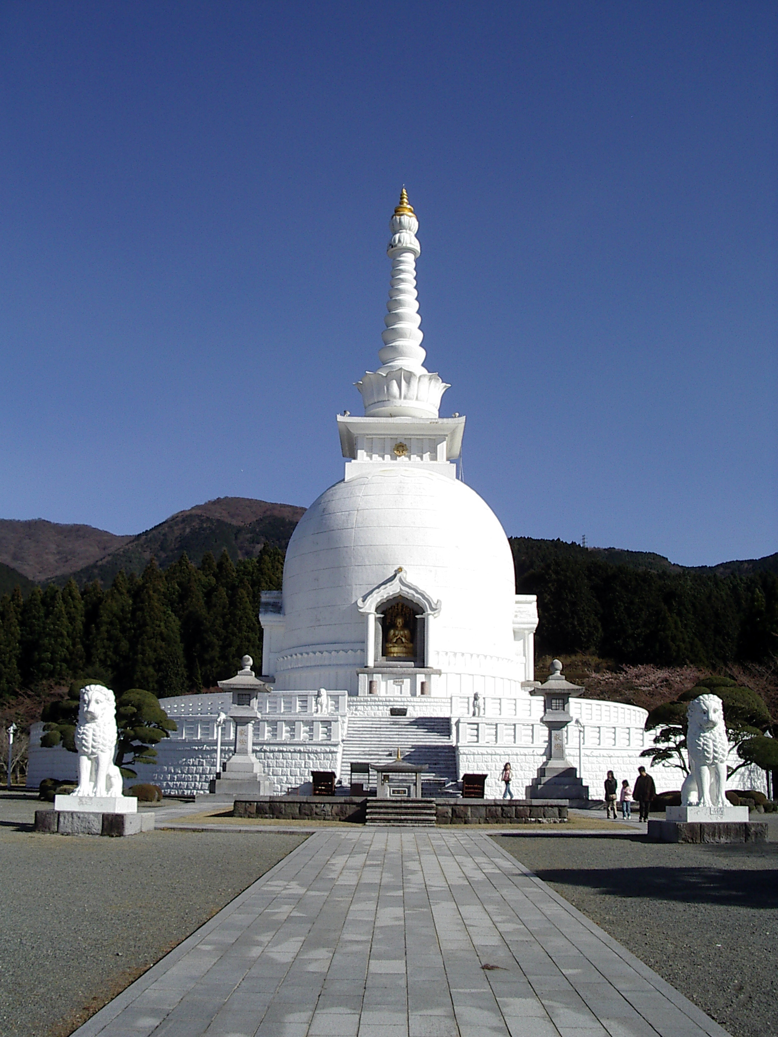 静岡県御殿場市の仏舎利塔 Stupa in Gotemba, Shizuoka, Japan.